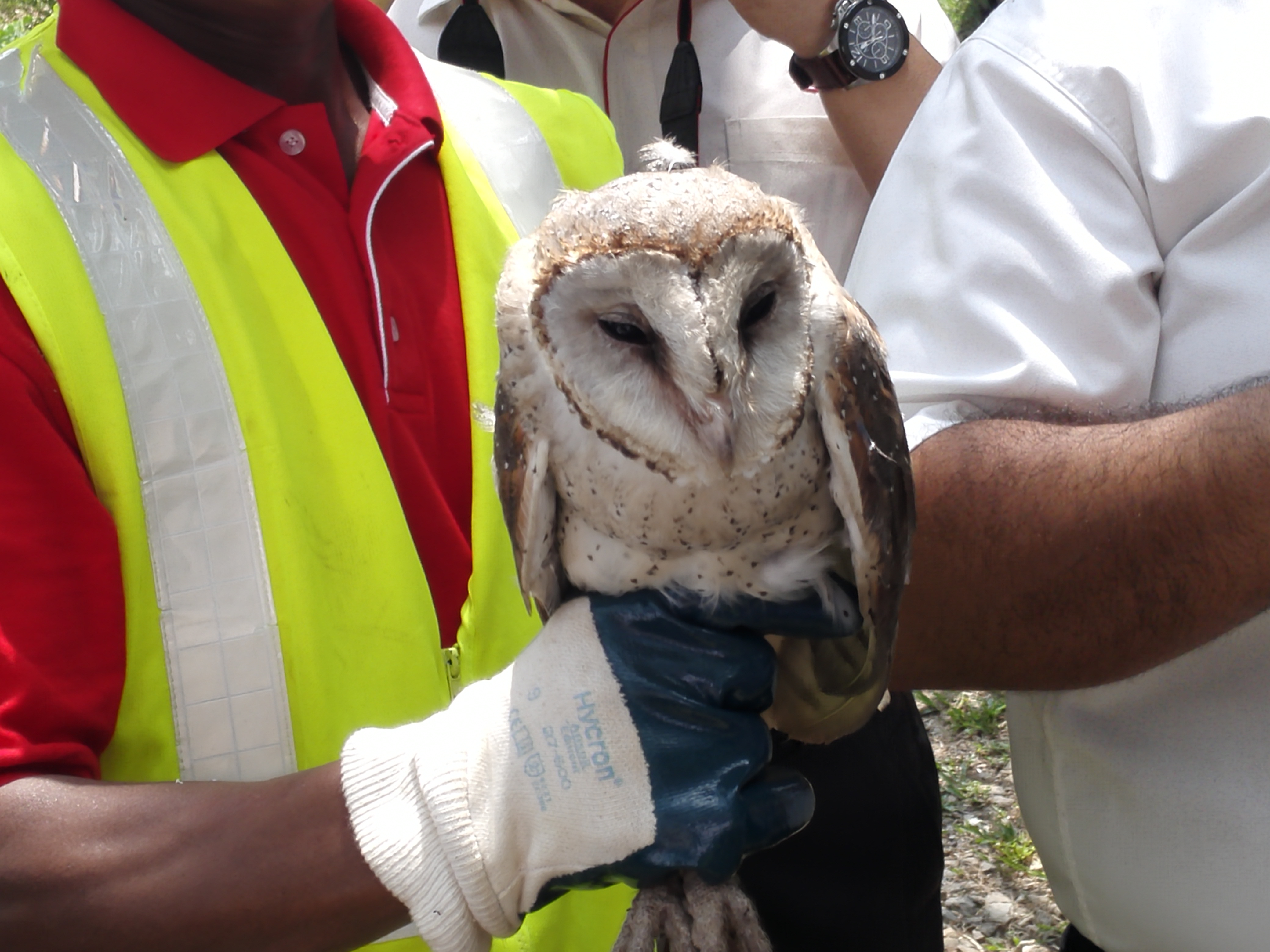 На плантациях масличных пальм для борьбы с грызунами широко используются пернатые хищники - сипухи